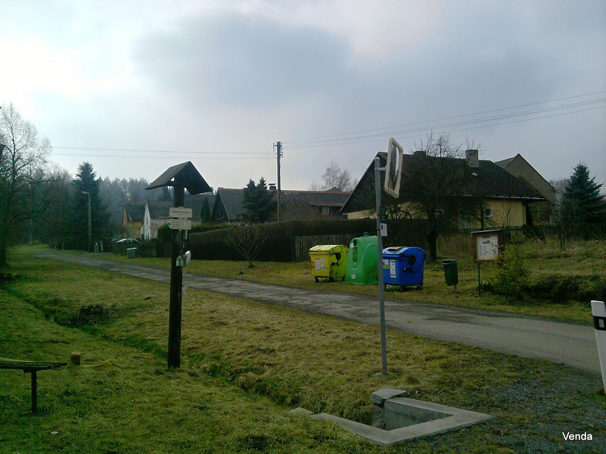 349 53 Bezdružice, Czech Republic